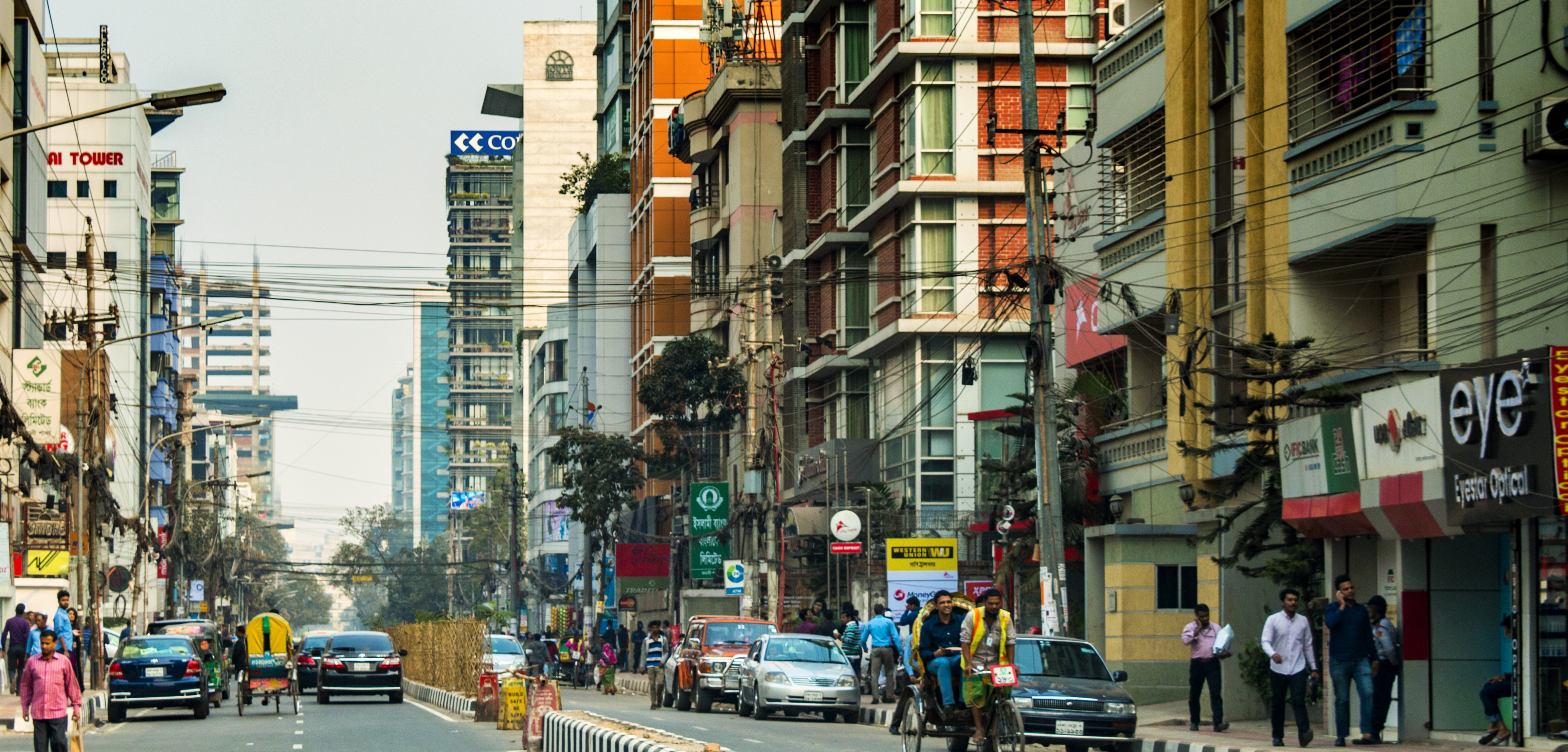 Dhaka